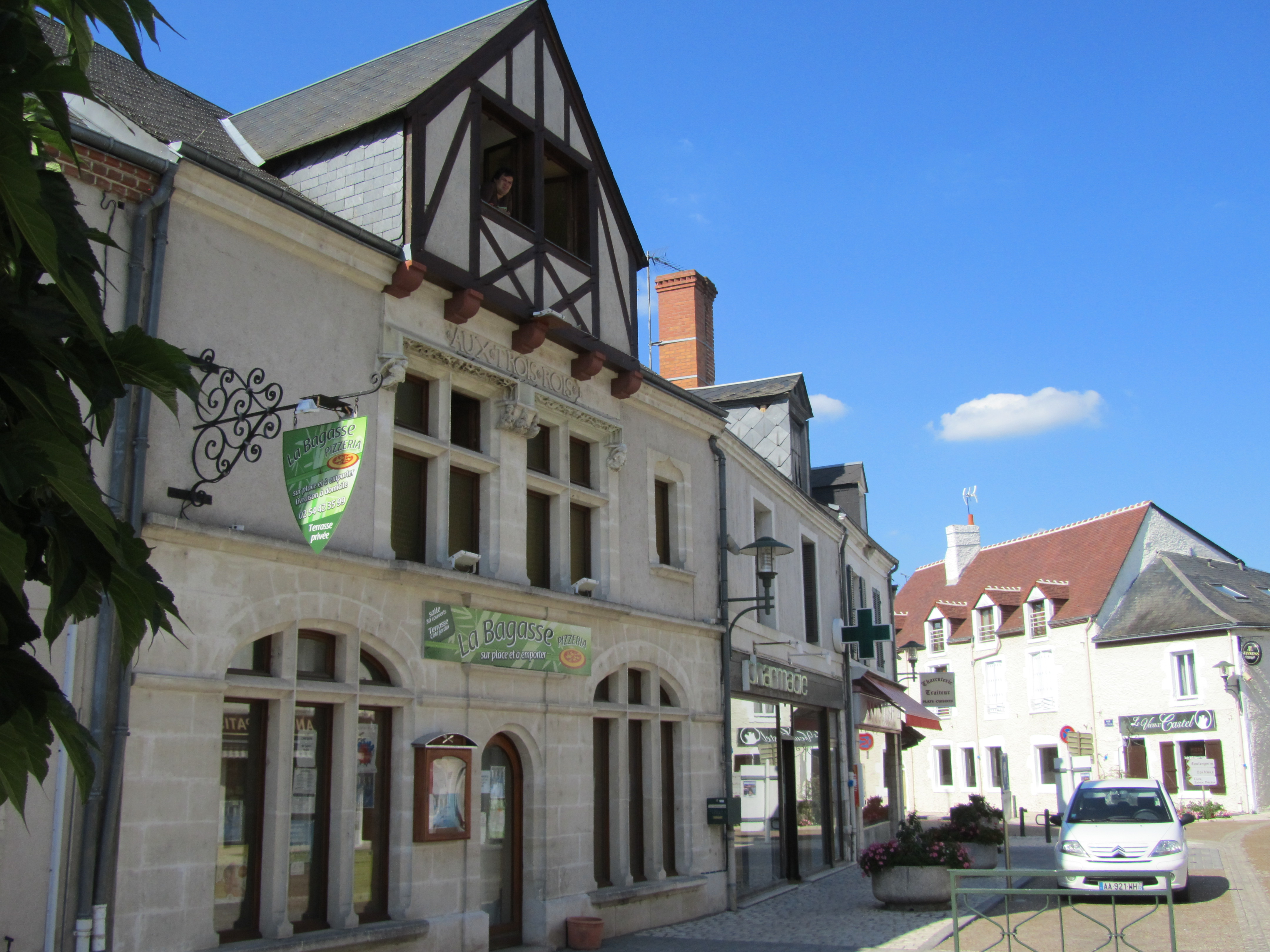 Le bourg, route d'Orléans